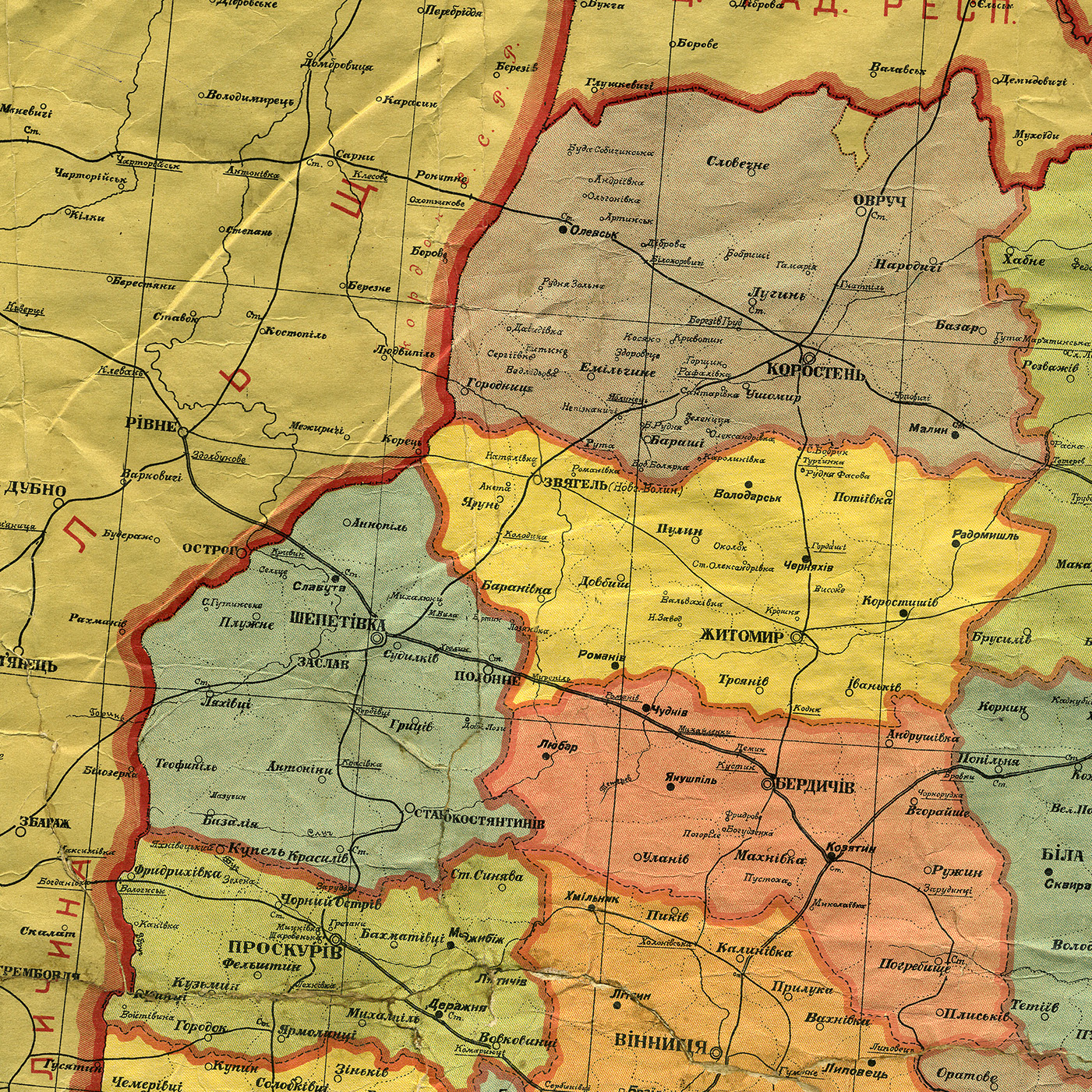 Територія колишньої Волинської губернії, фрагмент мапи Української соц. рад. республіки, адміністративний поділ від 1 жовтня 1925